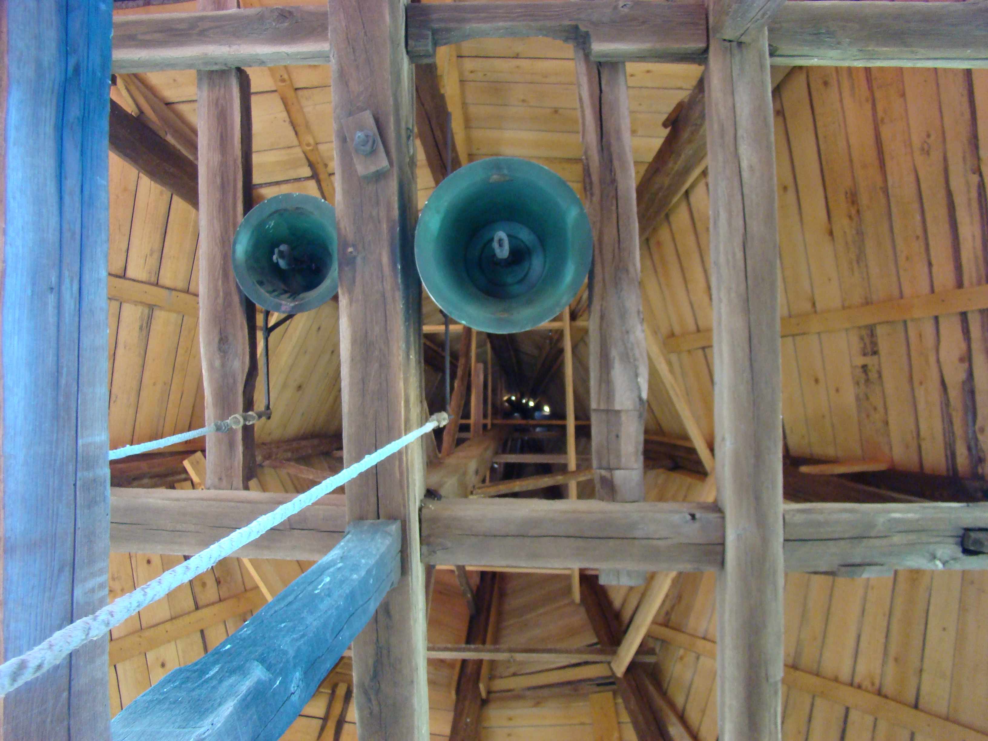 Biserica "Buna Vestire", sat ROŞCANI; comuna DOBRA